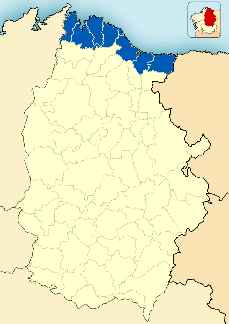 Concellos de la costa lucense.